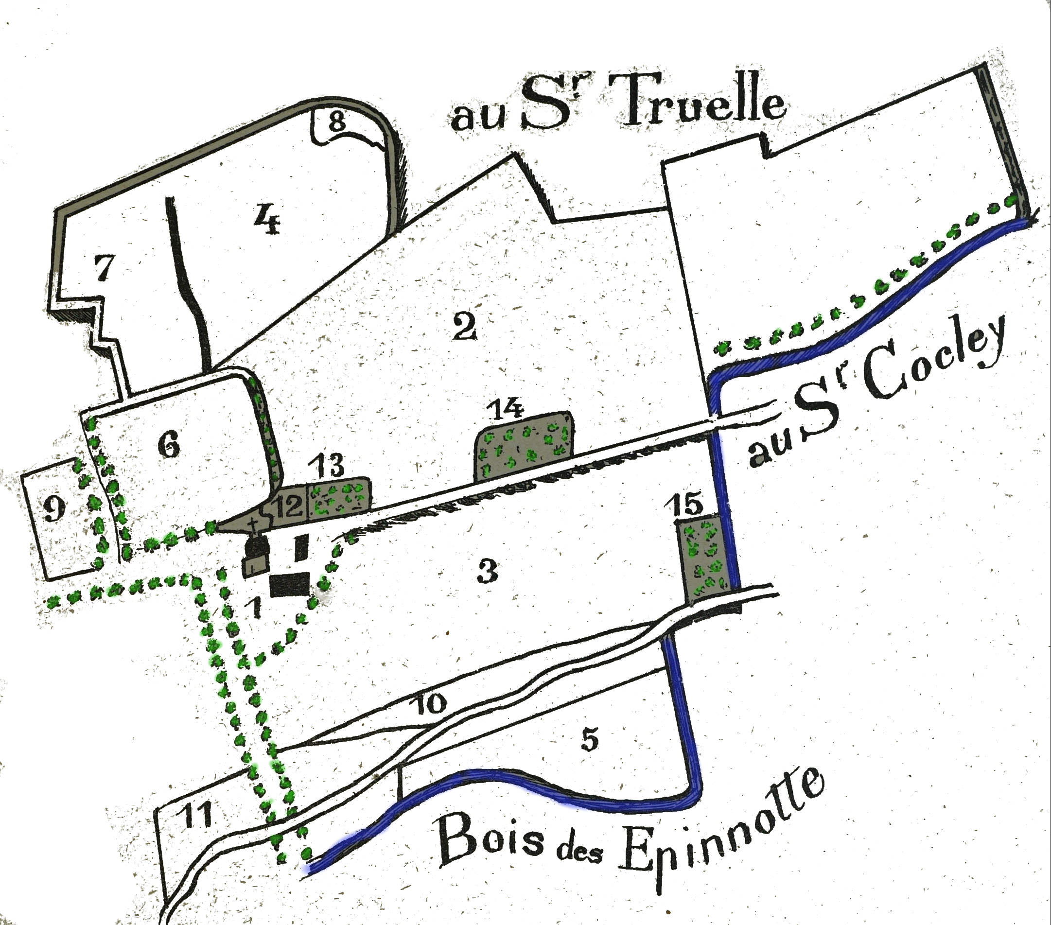 cf. titre de l'image